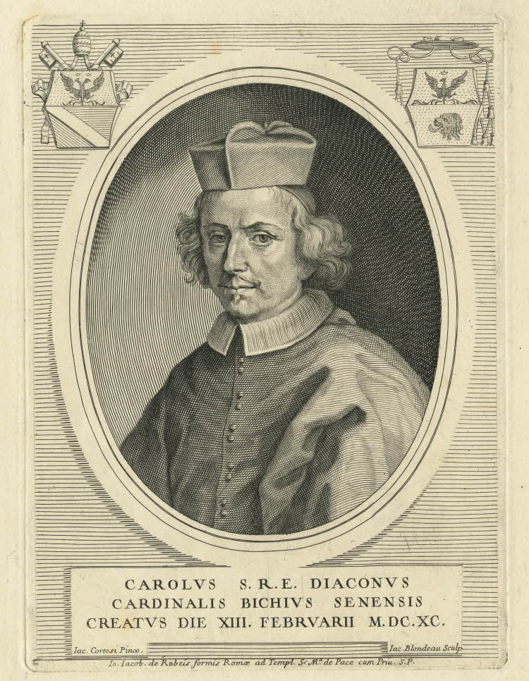 Cardinale Carlo Bichi (1638–1718)